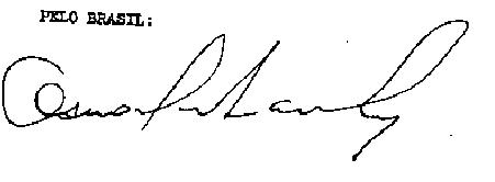 Assinatura do brasileiro Osvaldo Aranha.